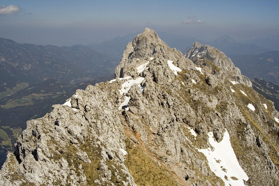 Na hřebeni Koschuta